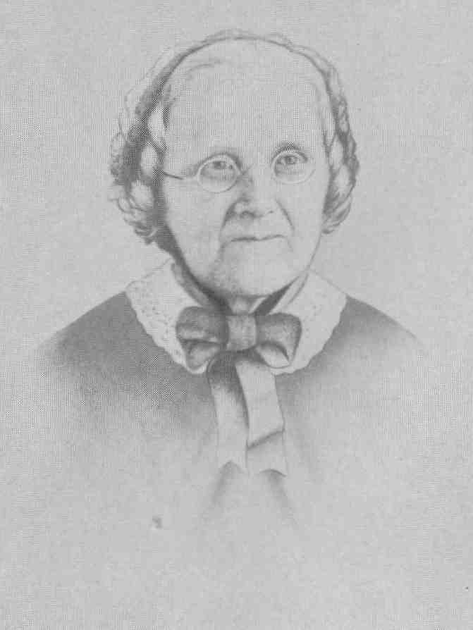 (Aletta Christiane) Luise Gauß geb. Fallenstein (1813–1883), Ehefrau von Wilhelm Gauß.